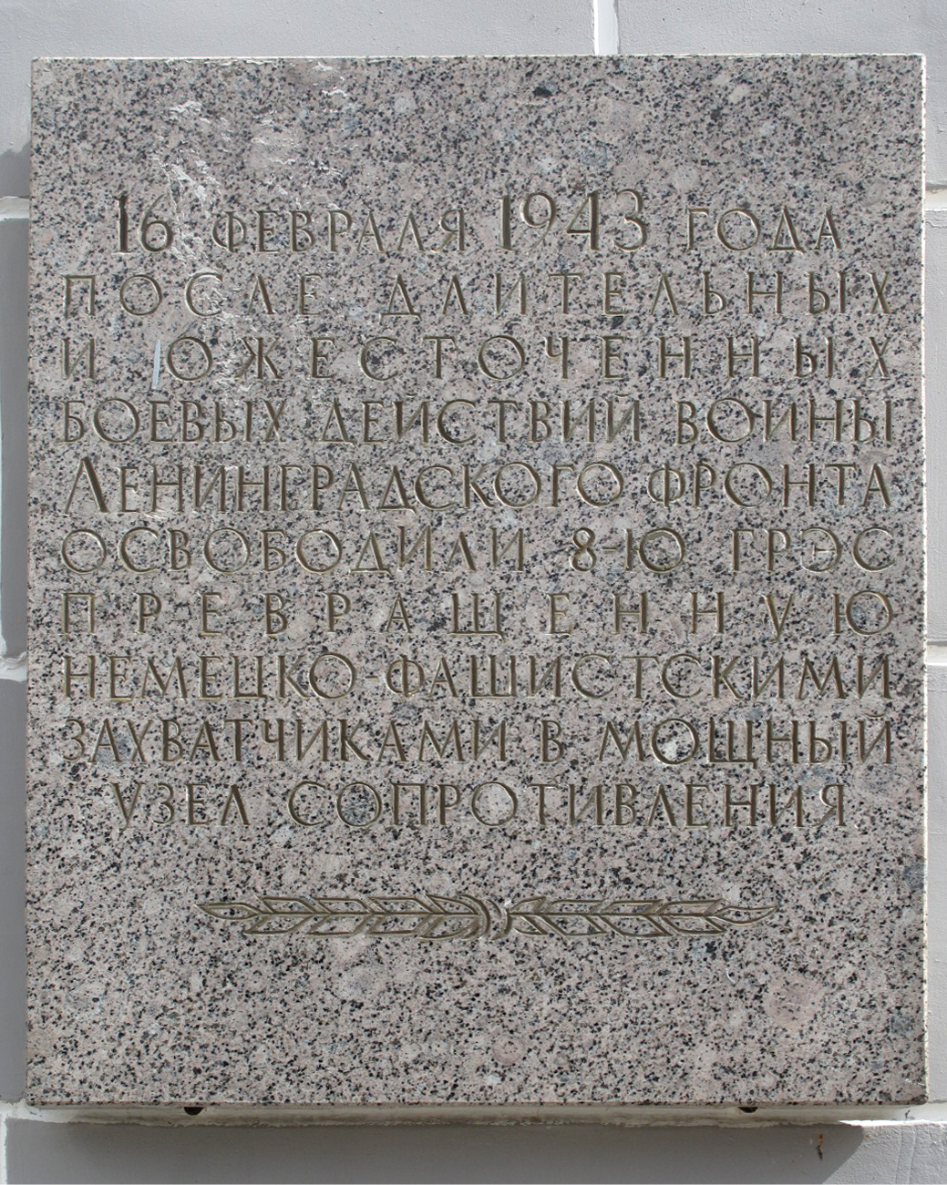 Мемориальная доска на здании Дубровской ТЭЦ (8-я ГРЭС), город Кировск Ленинградской области.